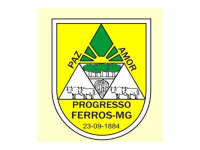 Brasão de Ferros - MG